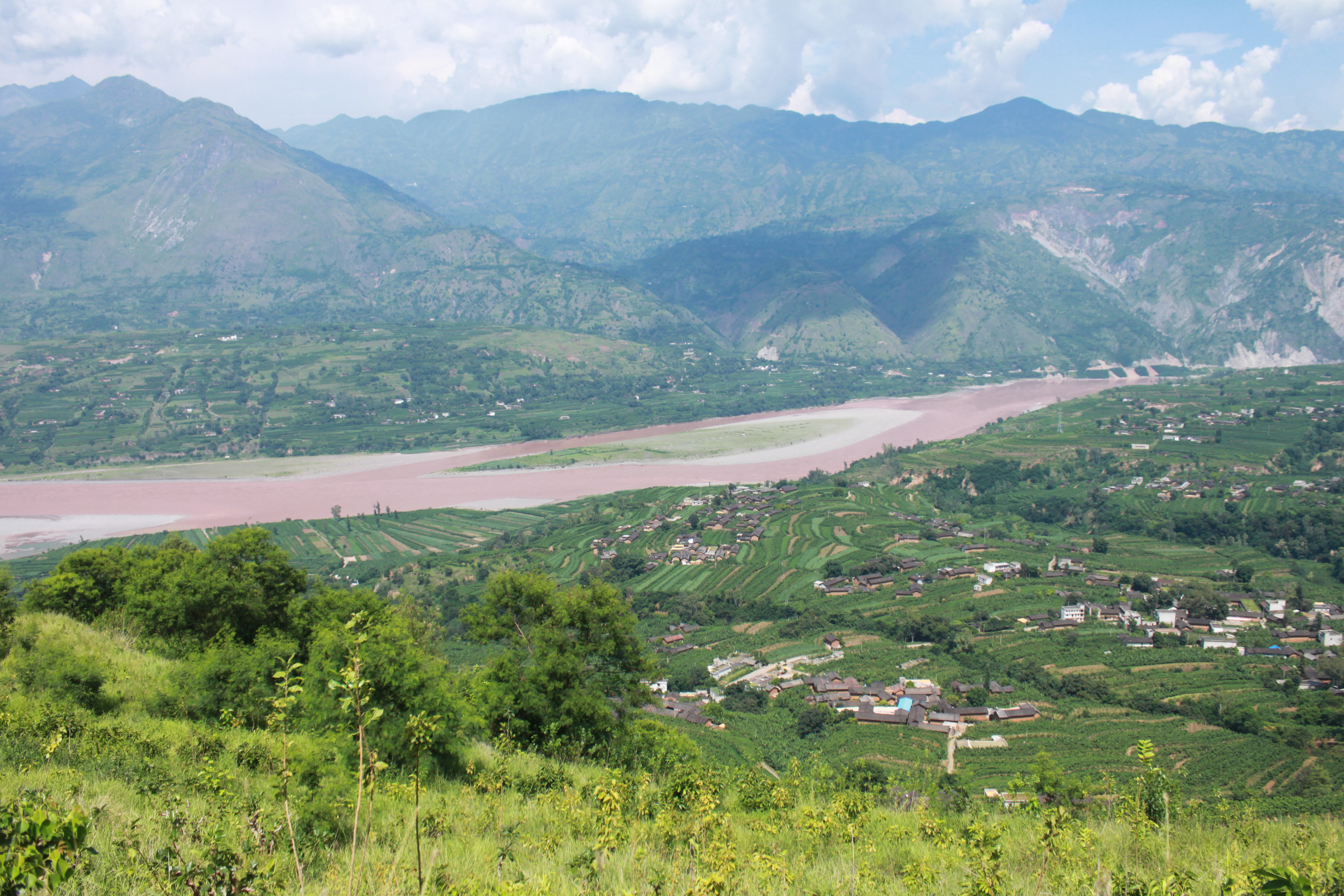 Huidong, Liangshan, Sichuan, China